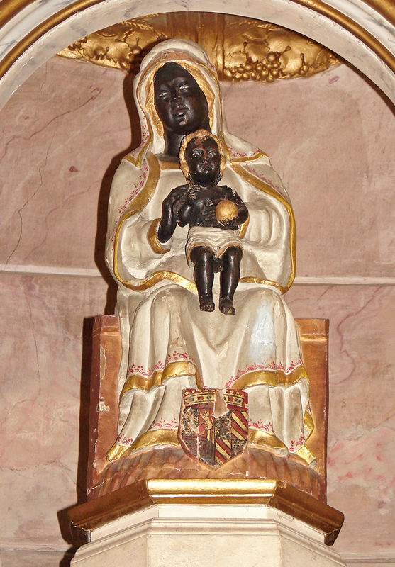 Saint-Romain-d'Ay vierge